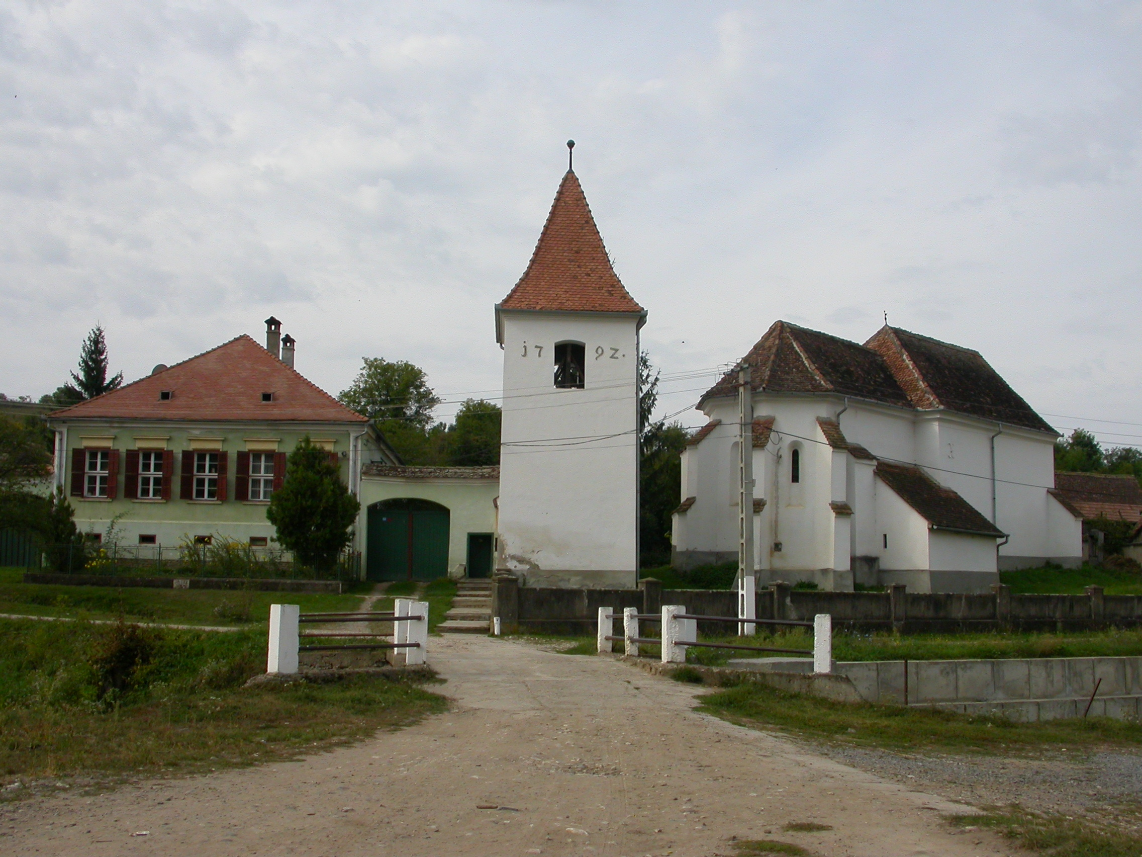 Ansamblul bisericii evanghelice, sec. XV - XVIII